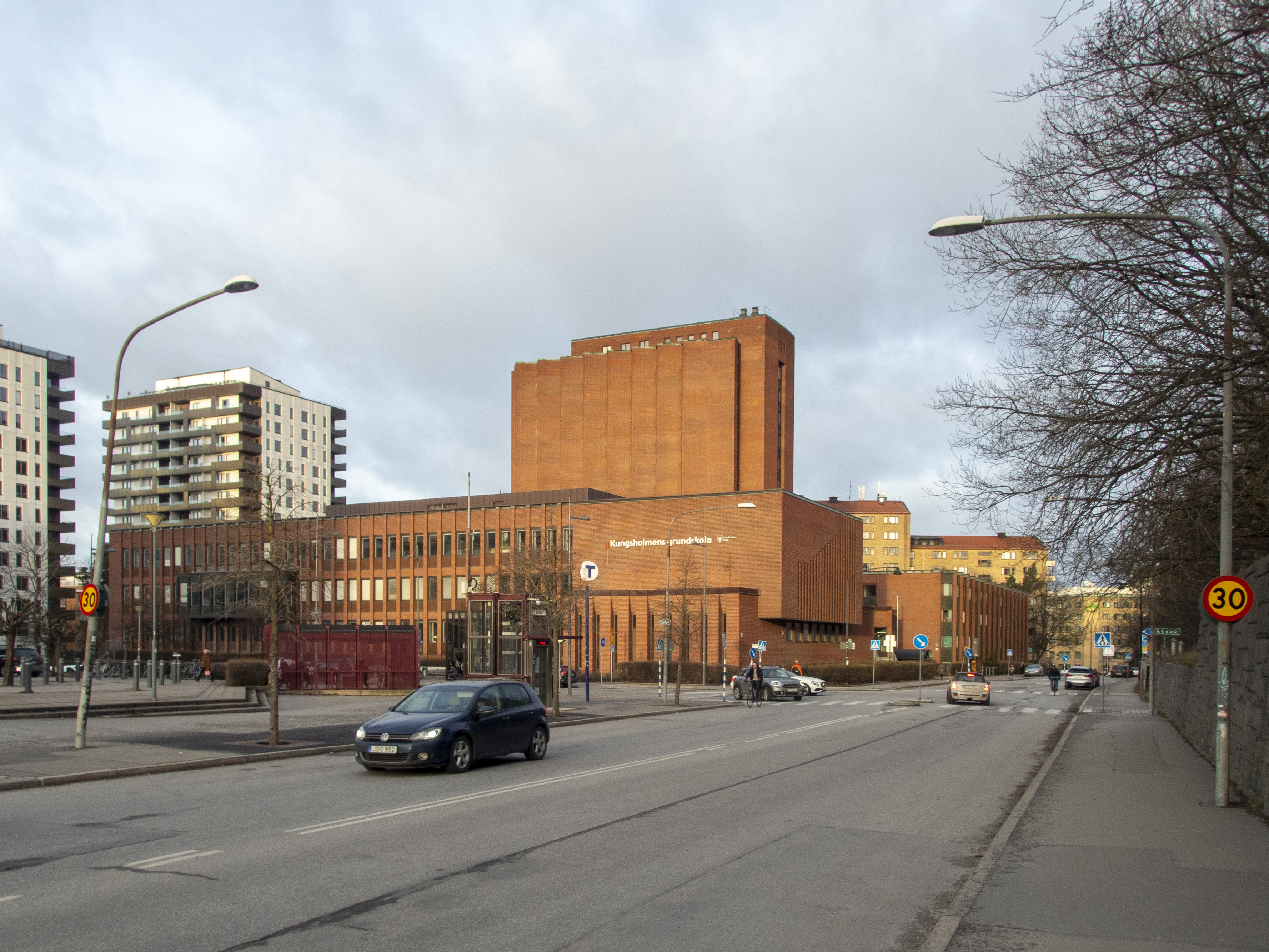 Kungsholmens grundskola. Tjället 8 & 9, Stockholm Kellgrensgatan 4, Sankt Göransgatan 145-151. Nybyggnadsår 1966. Ivar Niss (Byggmästare) Stockholms Stads Sjukvårdsstyrelse (Byggherre) Tecab Konsulterande Arkitekter AB genom Anders Tengbom (Arkitekt). Den högre byggnaden uppfördes ursprungligen som sjuksköterskebostäder, medan den lägre inrymde Stadshagens sjuksköterskeskola.